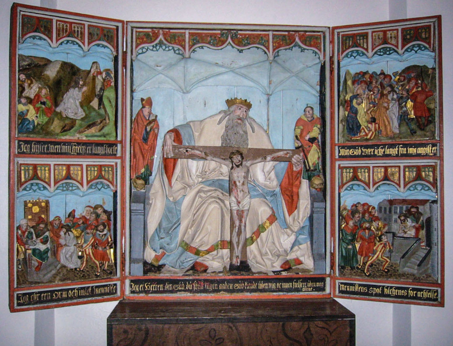 Tvings kyrka. Medeltida altarskåp